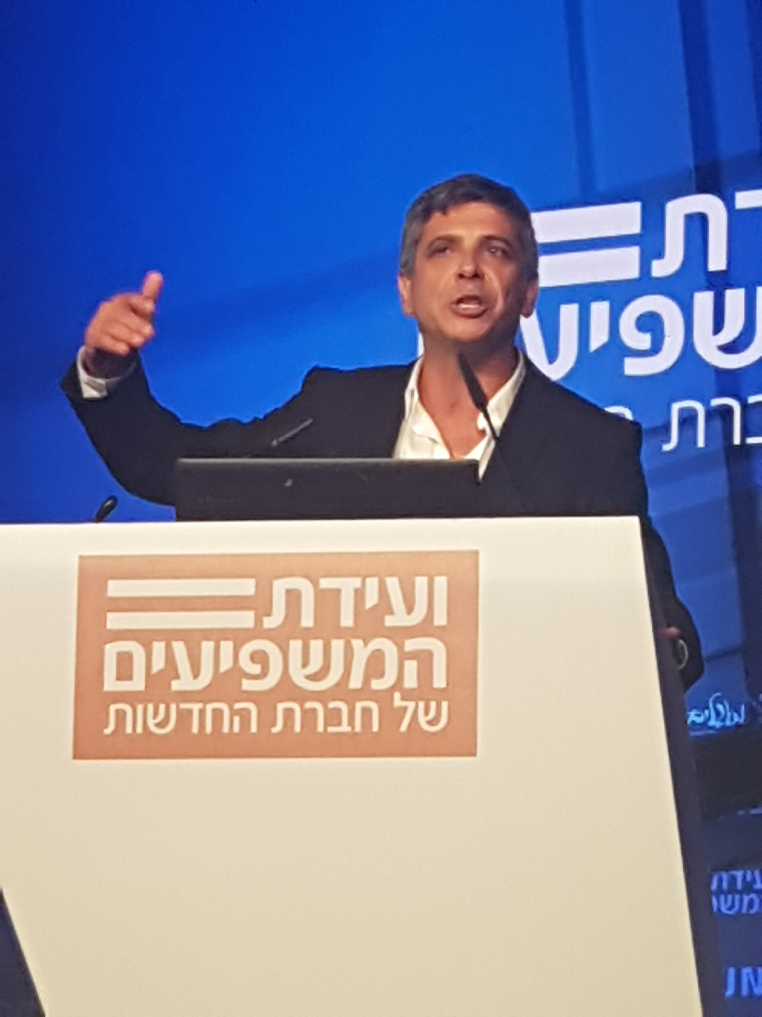 Avi Weiss